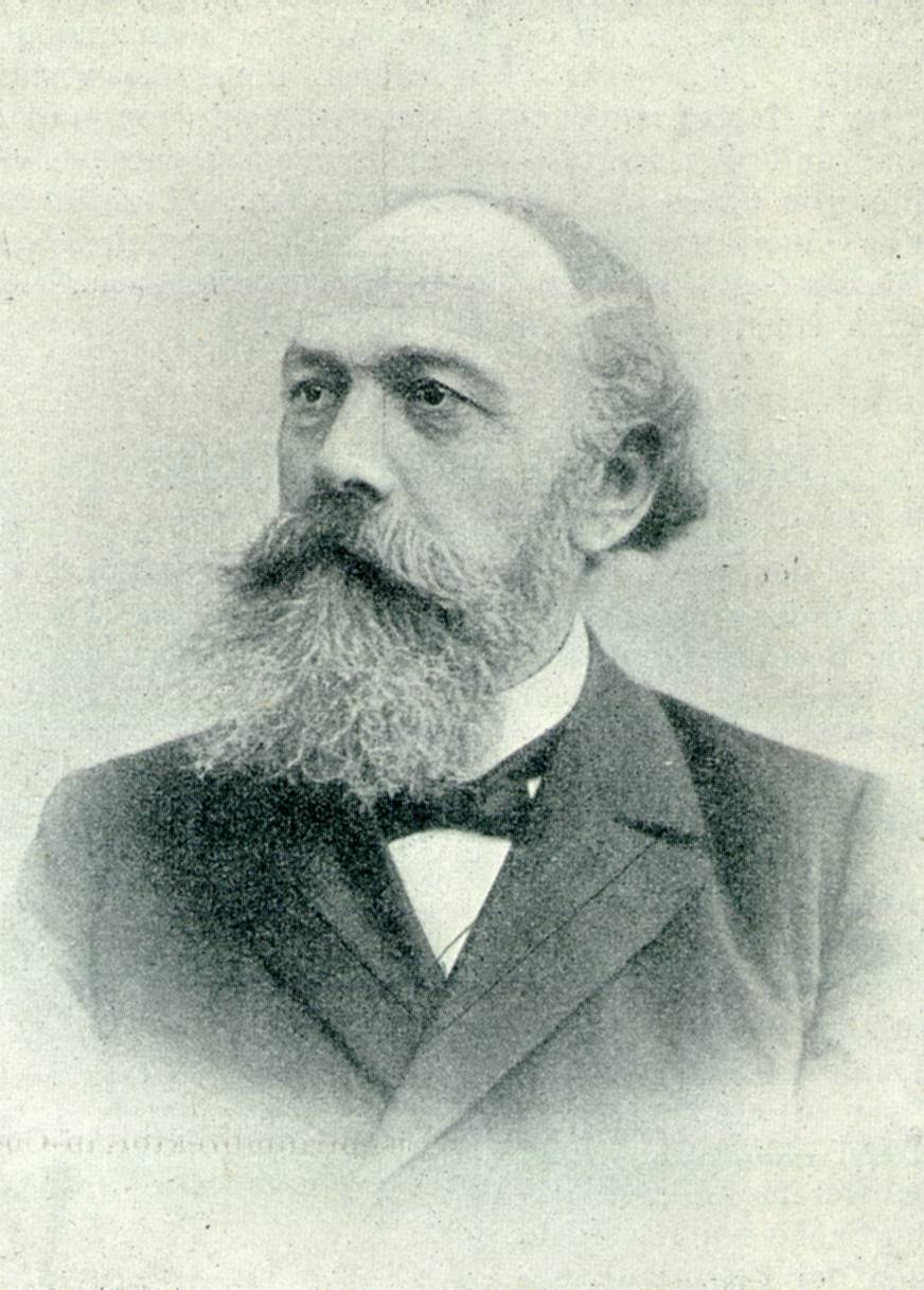 Otto Intze (* 17.5.1843, † 28.12.1904)